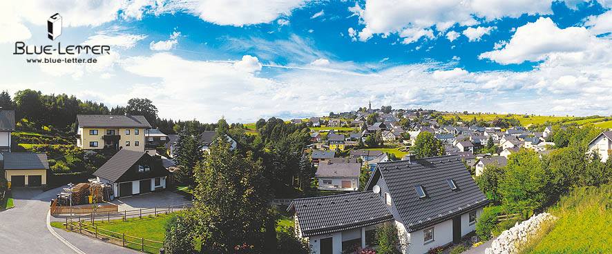 Panoramaansicht der Gemeinde Tschirn im Landkreis Kronach.